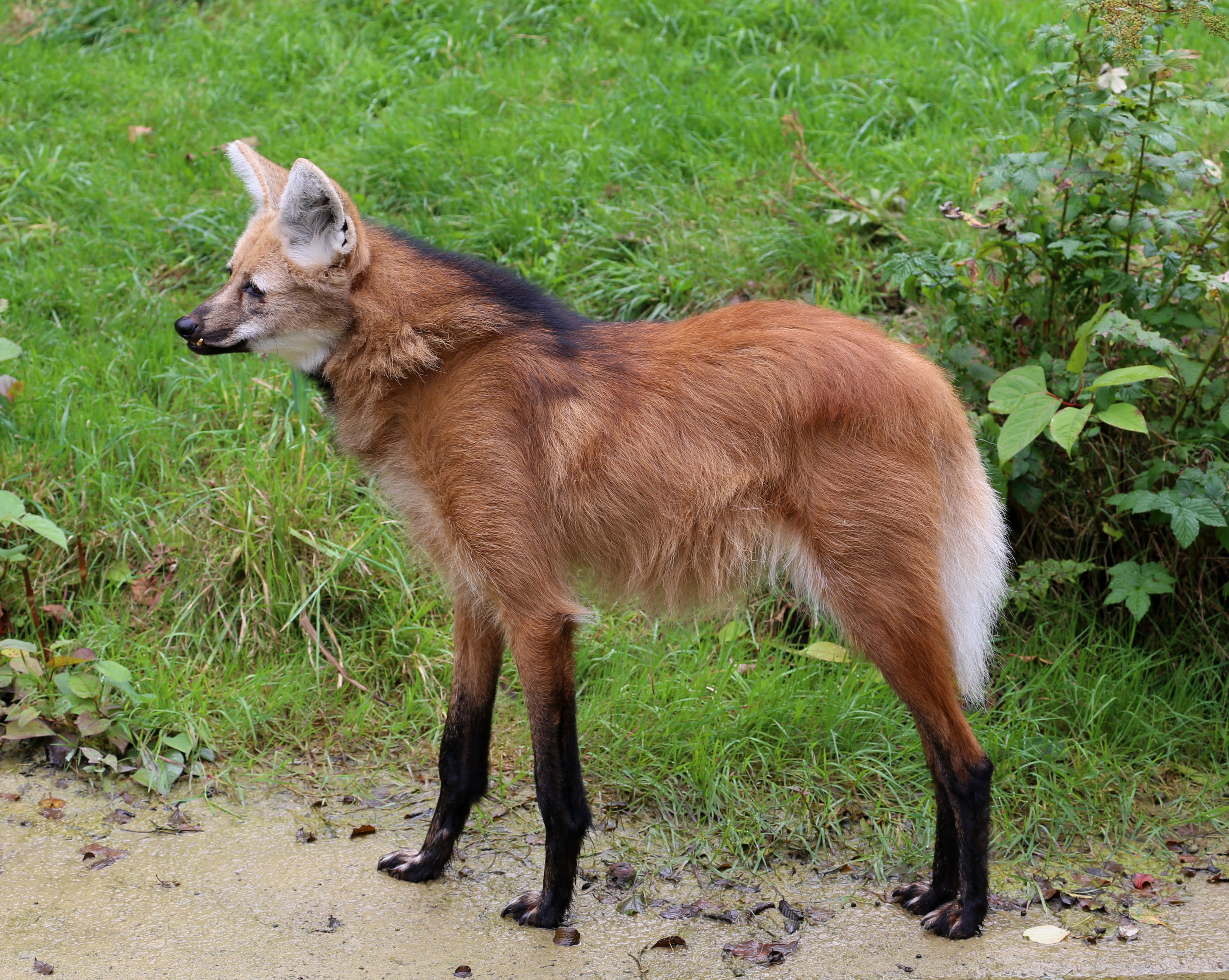 Tierpark Hellabrunn, Mähnenwolf, Chrysocyon brachyurus